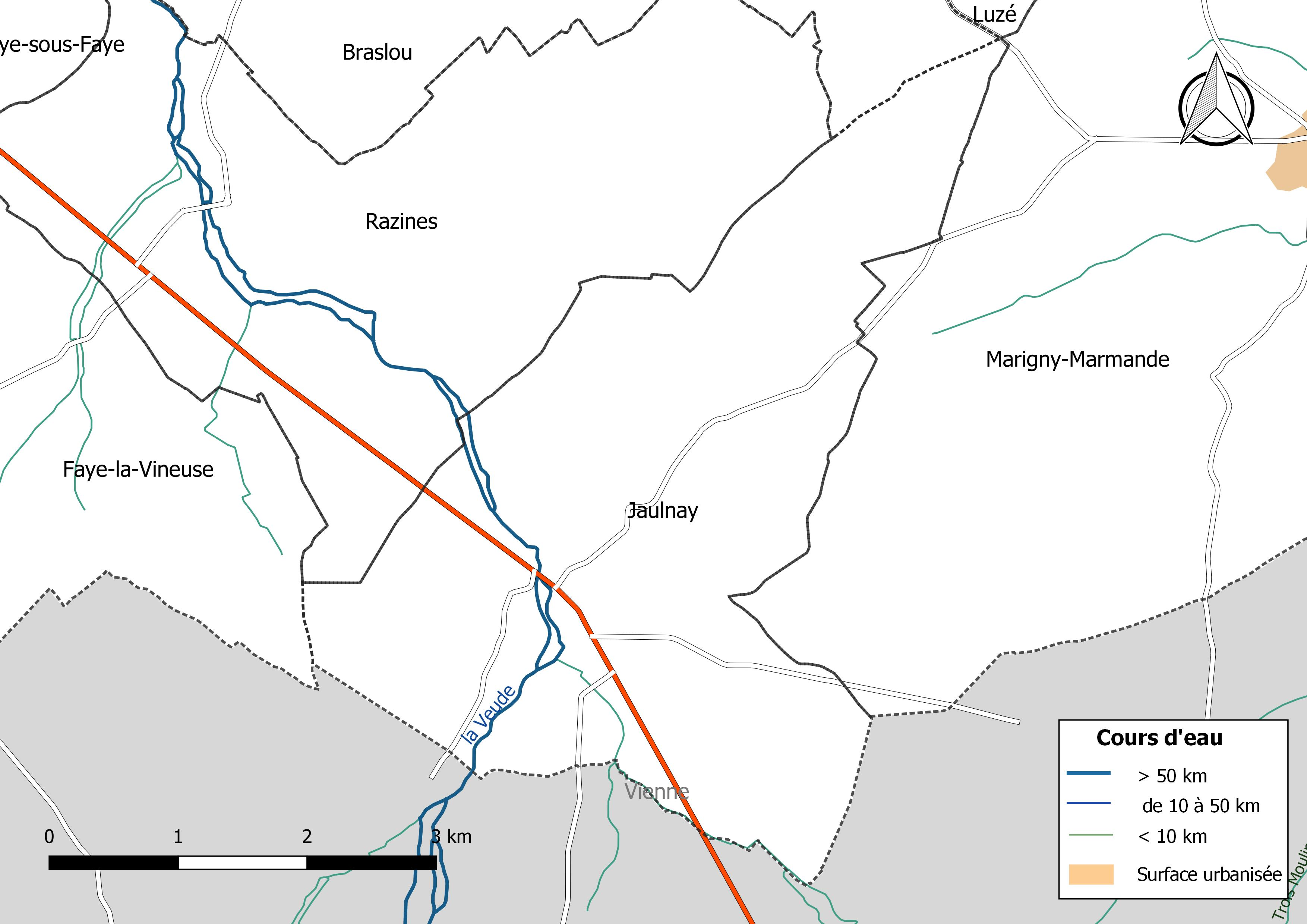 Carte du réseau hydrographique de la commune de Esves-le-Moutier (France).